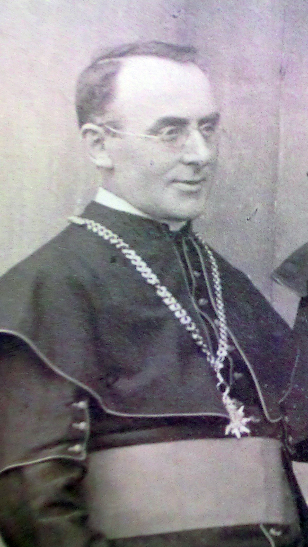 Kanovník Josef Kowař při setkání kapituly s litoměřickým biskupem Emanuelem Schöblem (cca 1904)